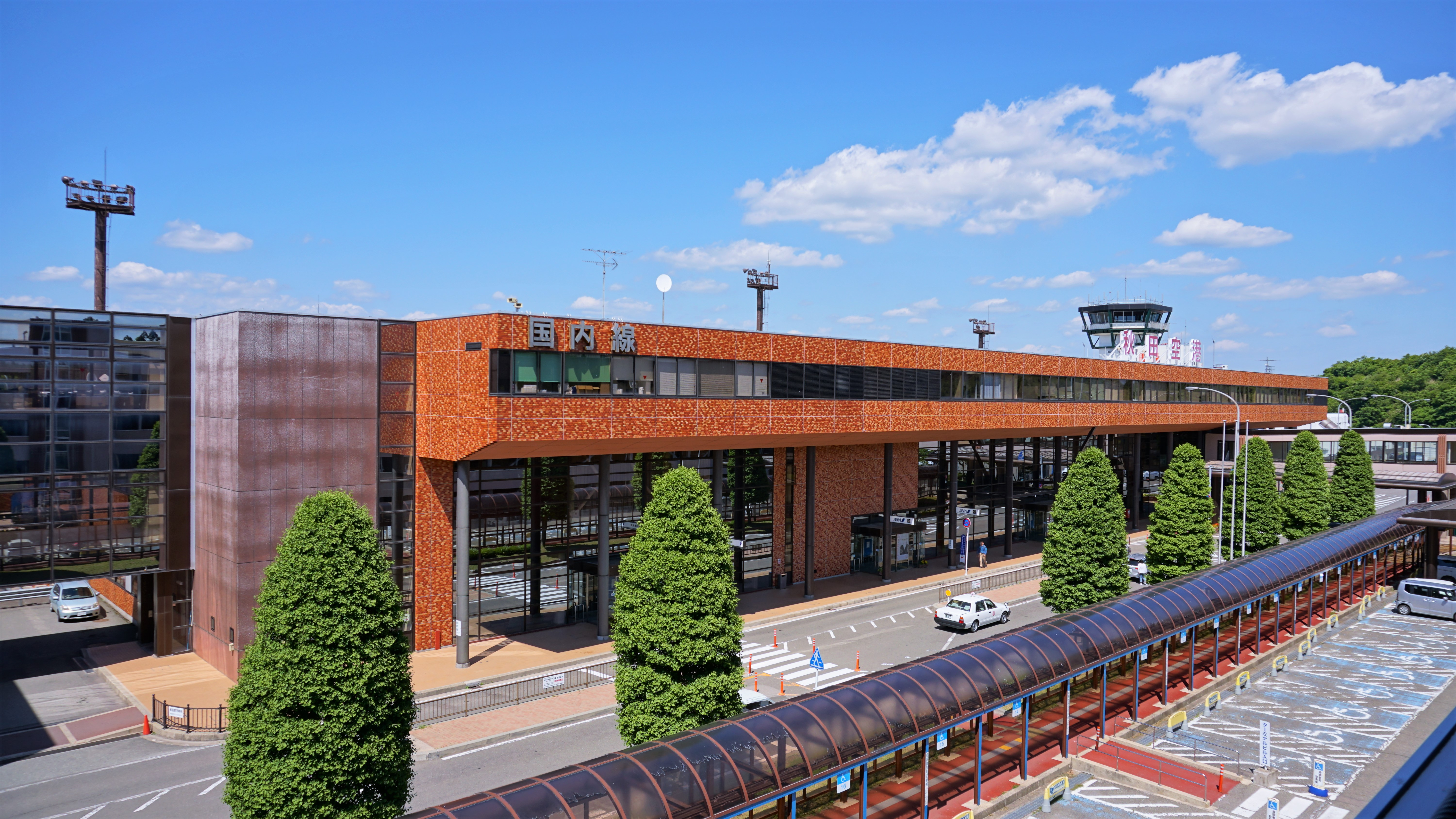 秋田空港国内線ターミナル